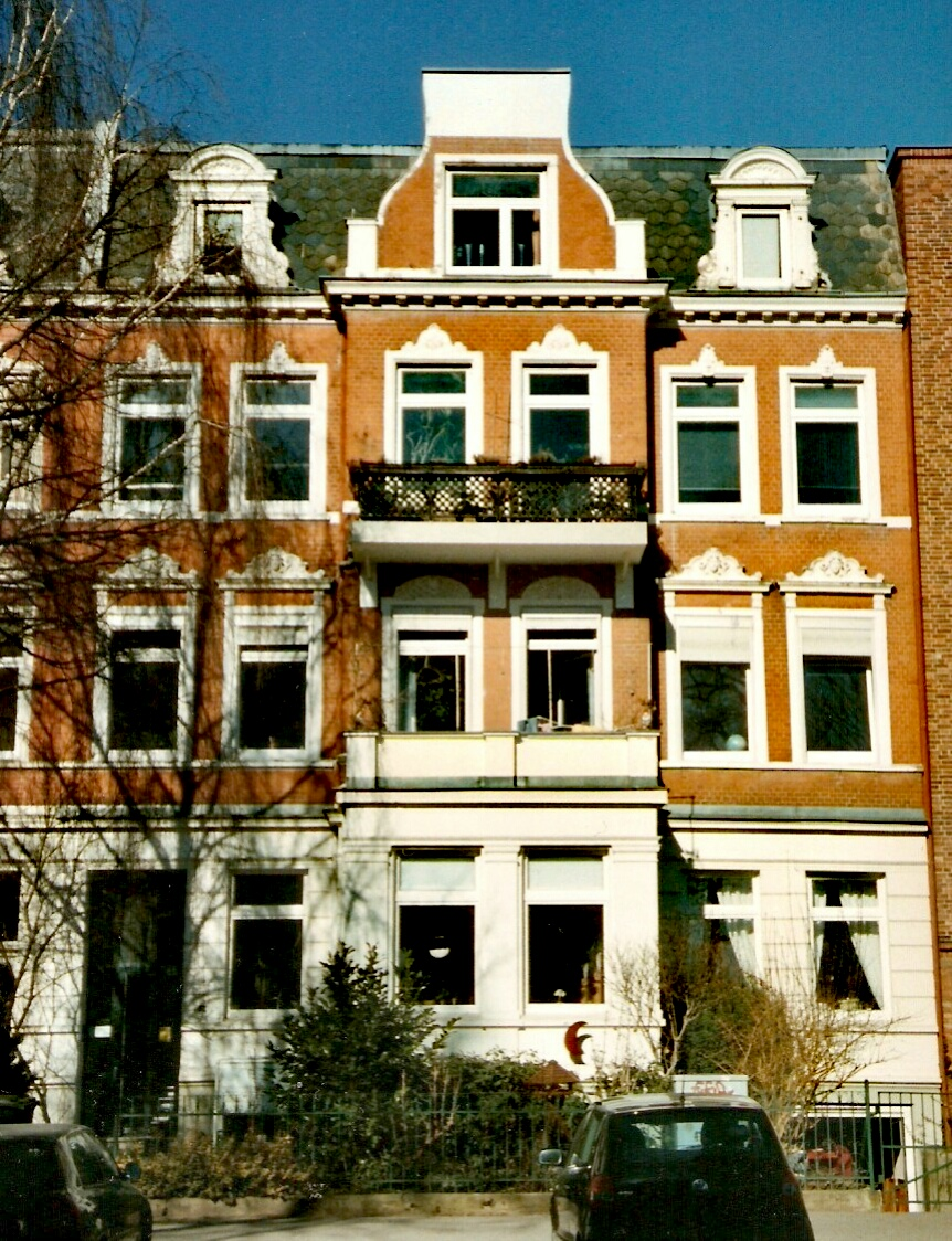 Alterswohnsitz von Heinrich Kühne